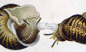 Reproduction de l'escagot par ferussac (1820) - Snails mating